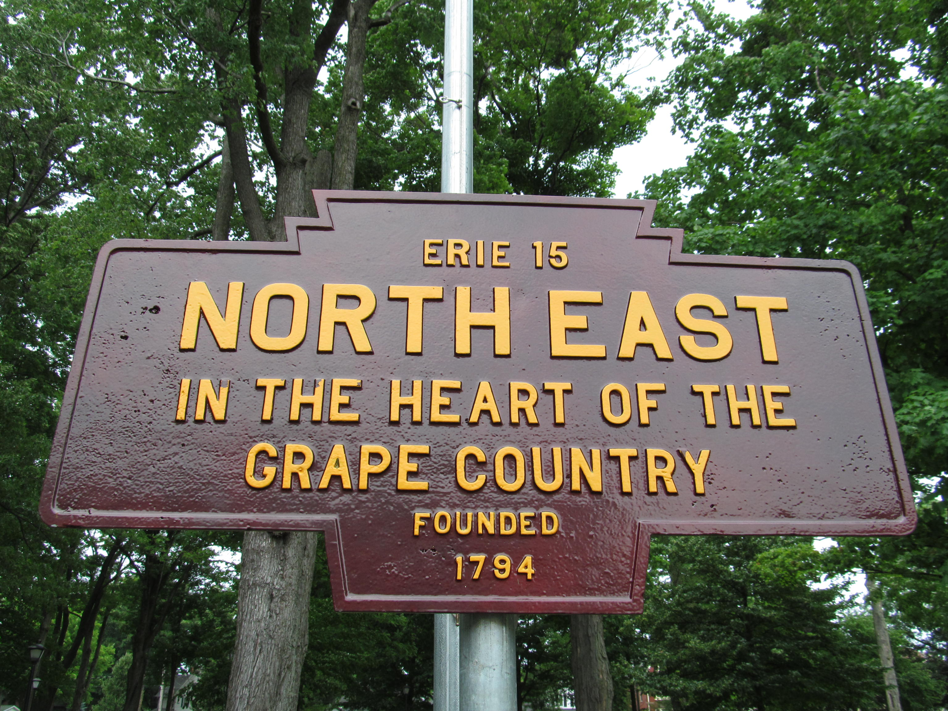 Keystone Marker for North East, Pennsylvania